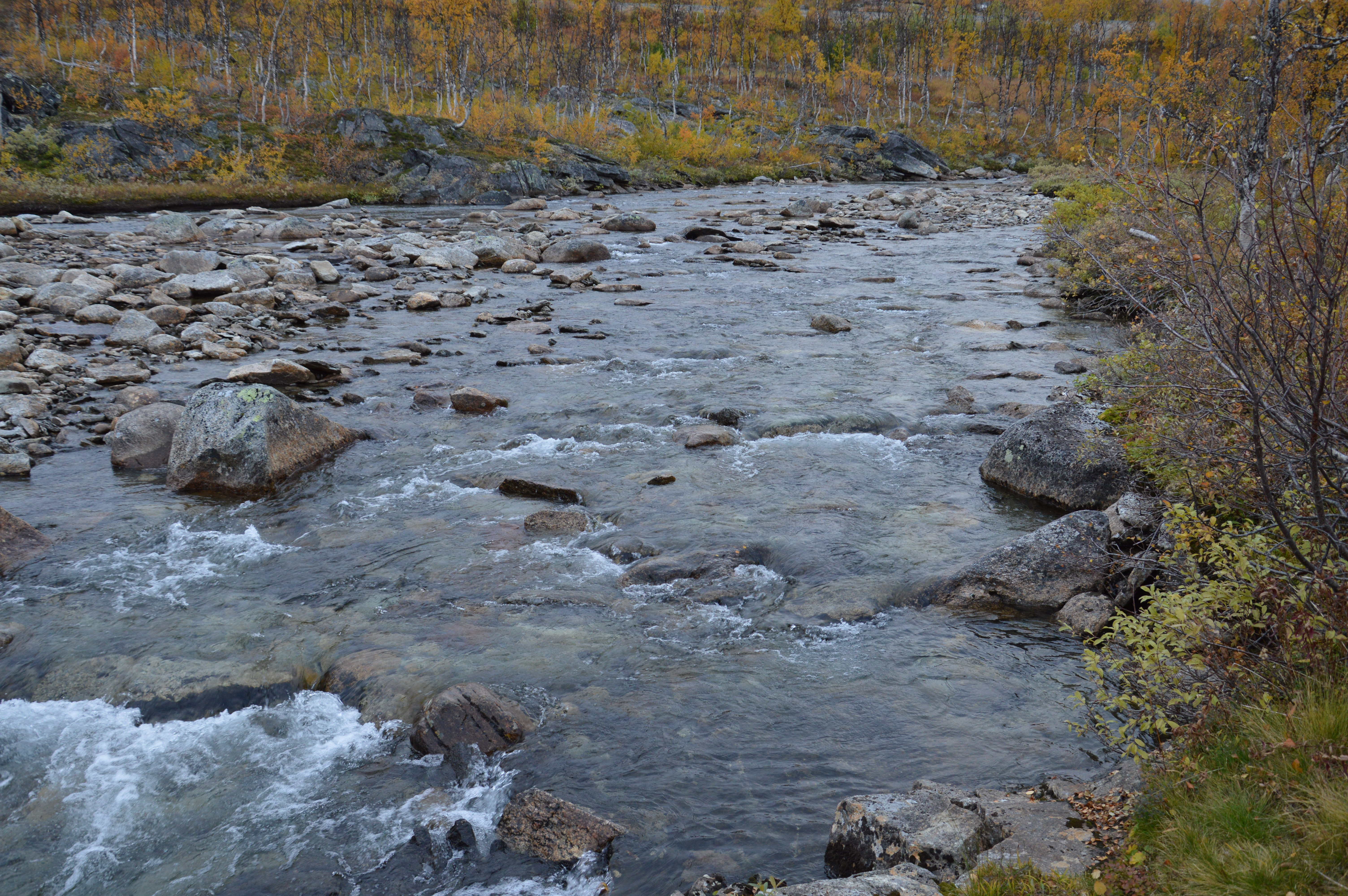 Gubbeltåga i nærheten av bomstasjonen like nord for brua i Stokkalia, den 25. september 2012